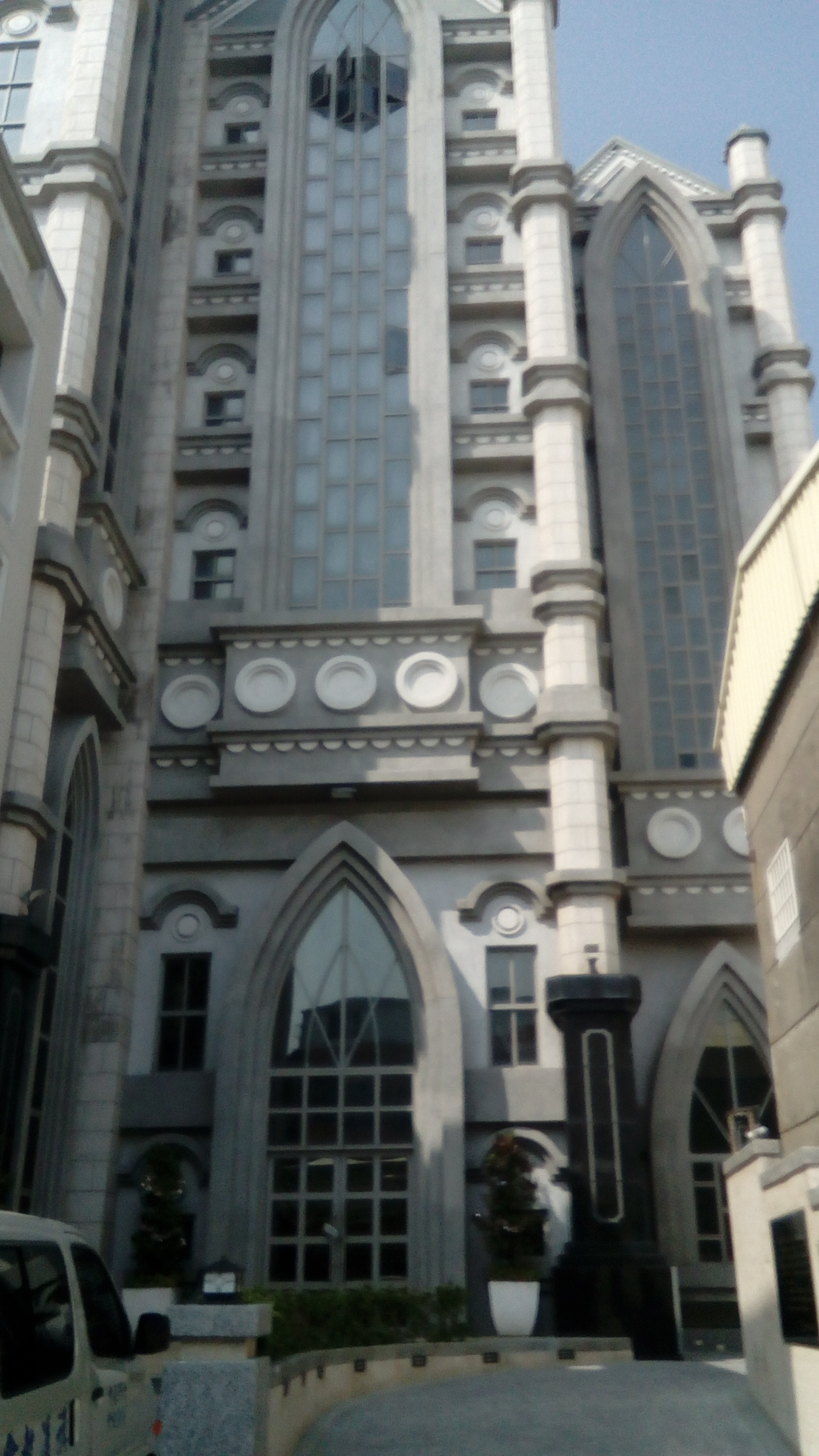 旗津區廟前街